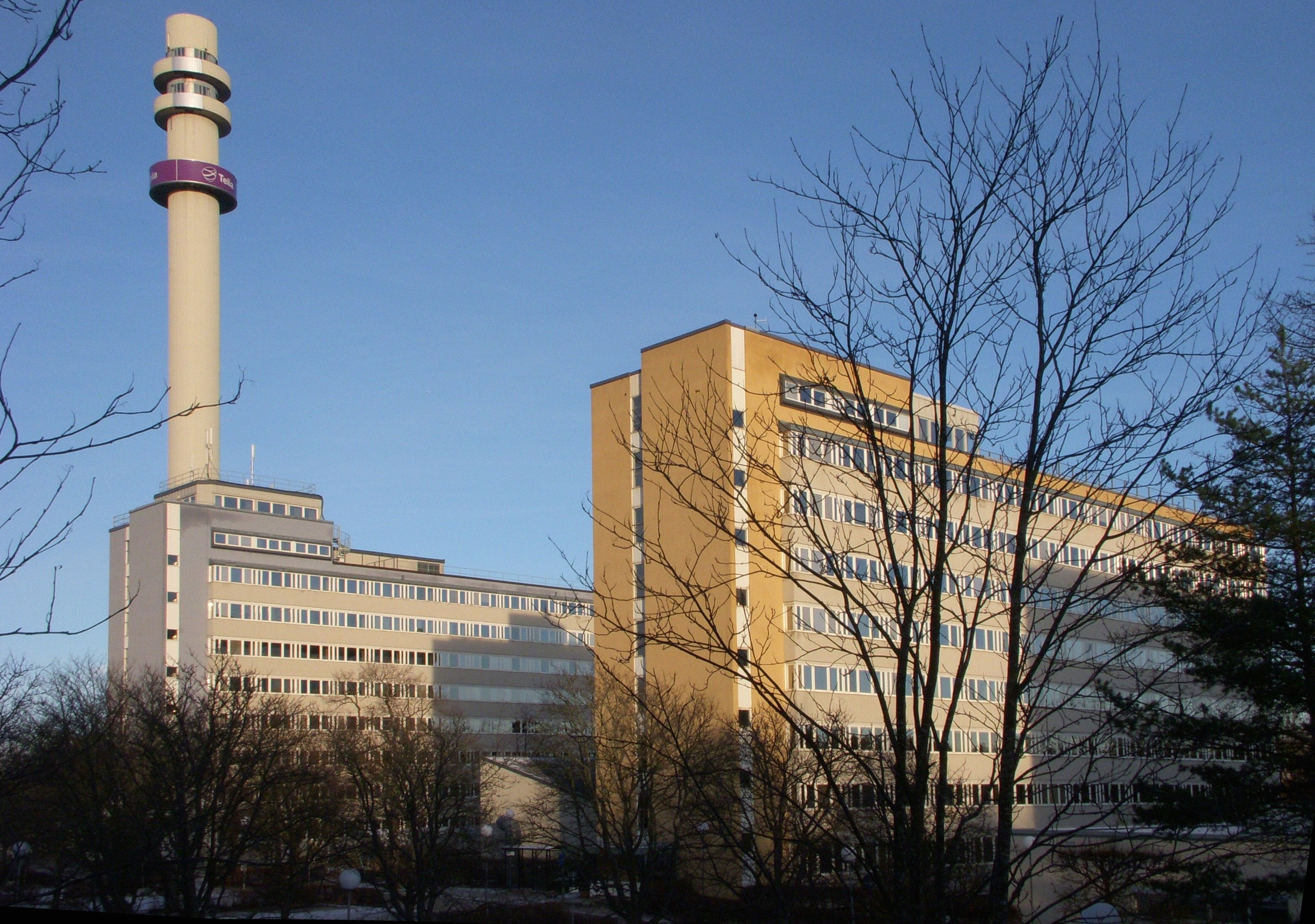 Telias huvudkontor i Farsta